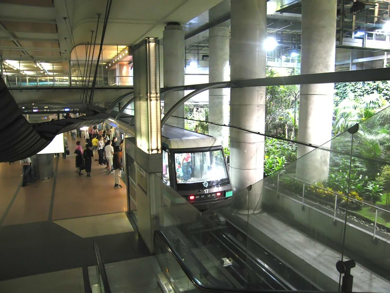 Metro de Paris Ligne 14 Station Gare de Lyon Lieu : Paris, France Date : juin 2006 Auteur : Pli!ne photo personnelle